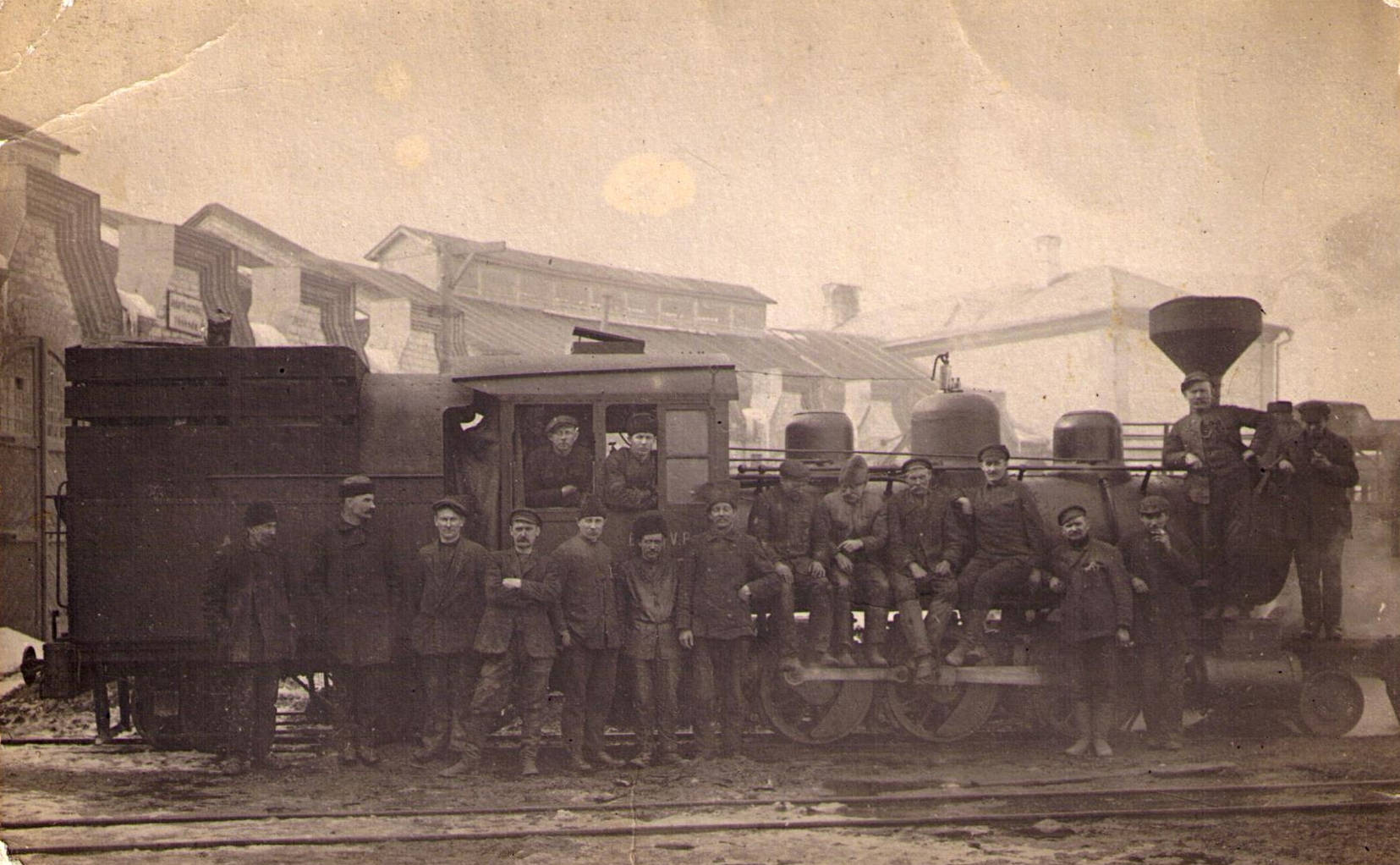 Nõmme kindluse depoo töölised